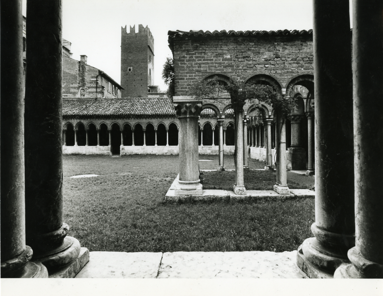 Servizio fotografico : Venezia, 1972 / Paolo Monti. - Stampe: 3 : Positivo b/n, gelatina bromuro d'argento/ carta, 24x30. - ((Al verso delle stampe manoscritti i numeri dei negativi corrispondenti (formato 35 mm) con indicazione del fotogramma: 1938. - Sul coperchio della scatola iscrizione didascalica manoscritta a pennarello nero: "Città storiche (Verona)". - Occasione: Documentazione per la pubblicazione: Brugnoli Pier Paolo, "Nella bella Verona", Bologna, Cappelli, 1972. - Fonte: Quaderno di Paolo Monti: Leica 1501-3000 Controllo numerazione (1950-1978), presso Archivio Paolo Monti. - Fonte: Monografia di Brugnoli, Pier Paolo: Nella bella Verona, Bologna, Cappelli (1972). - Fonte: Fattura di Paolo Monti: IV. Commesse/ Fattura/ Fotografie per illustrazione del volume Verona (1972/12/20), presso Archivio Paolo Monti. N. 292 riprese fotografiche della città di Verona in formato 24x30